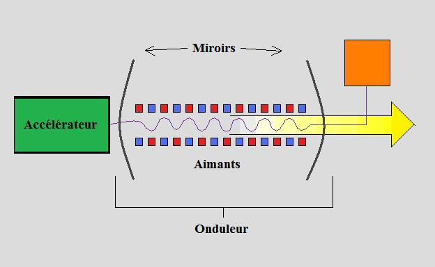 Ce type de laser utilise des électrons qui passent par un accélérateur, et un onduleur qui crée un champ magnétique pour pouvoir produire des photons de lumière.